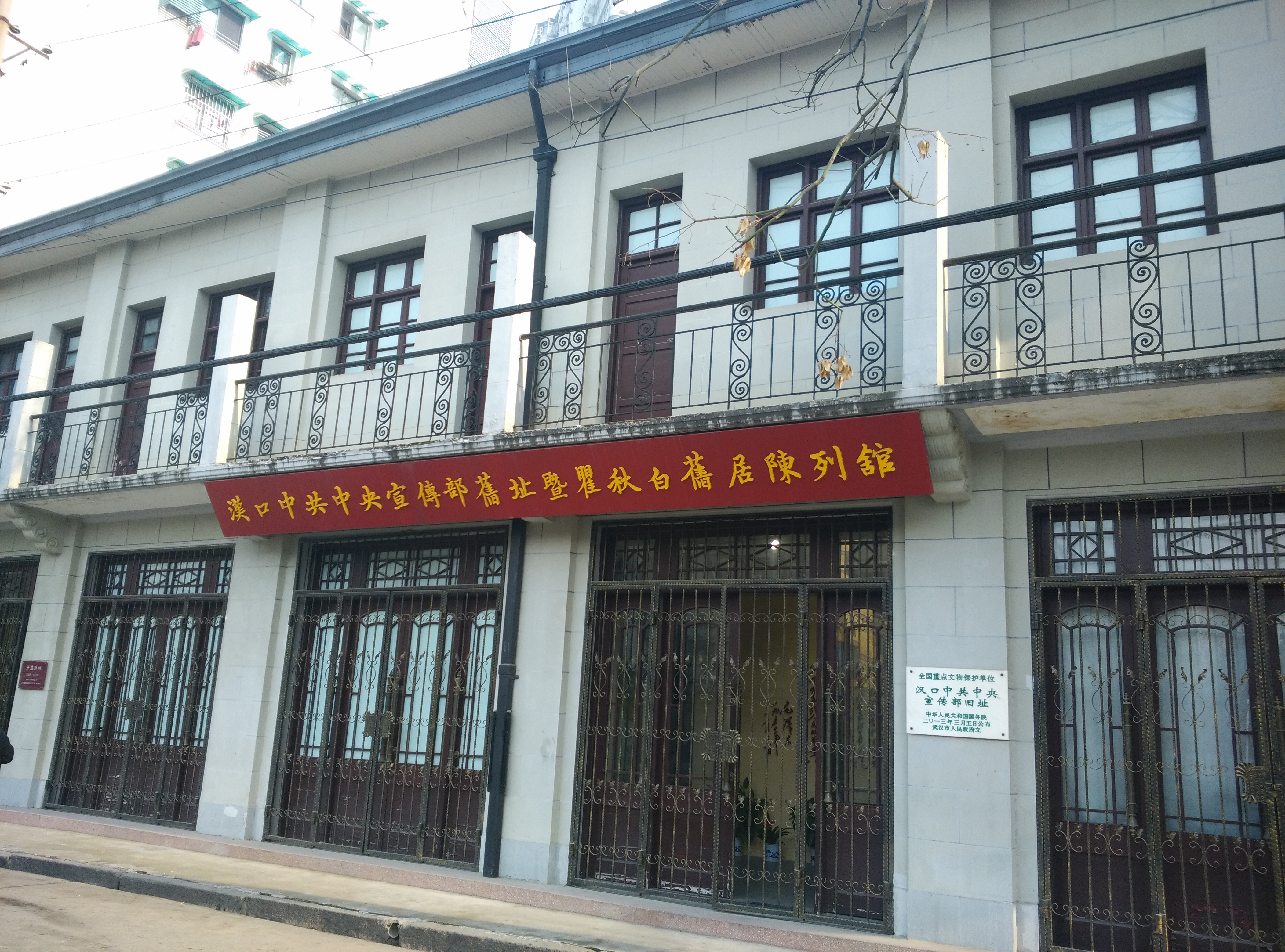 汉口中共中央宣传部侧面照片，拍摄于2018年1月